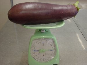 市場に出回るのは400ｇ以上です。